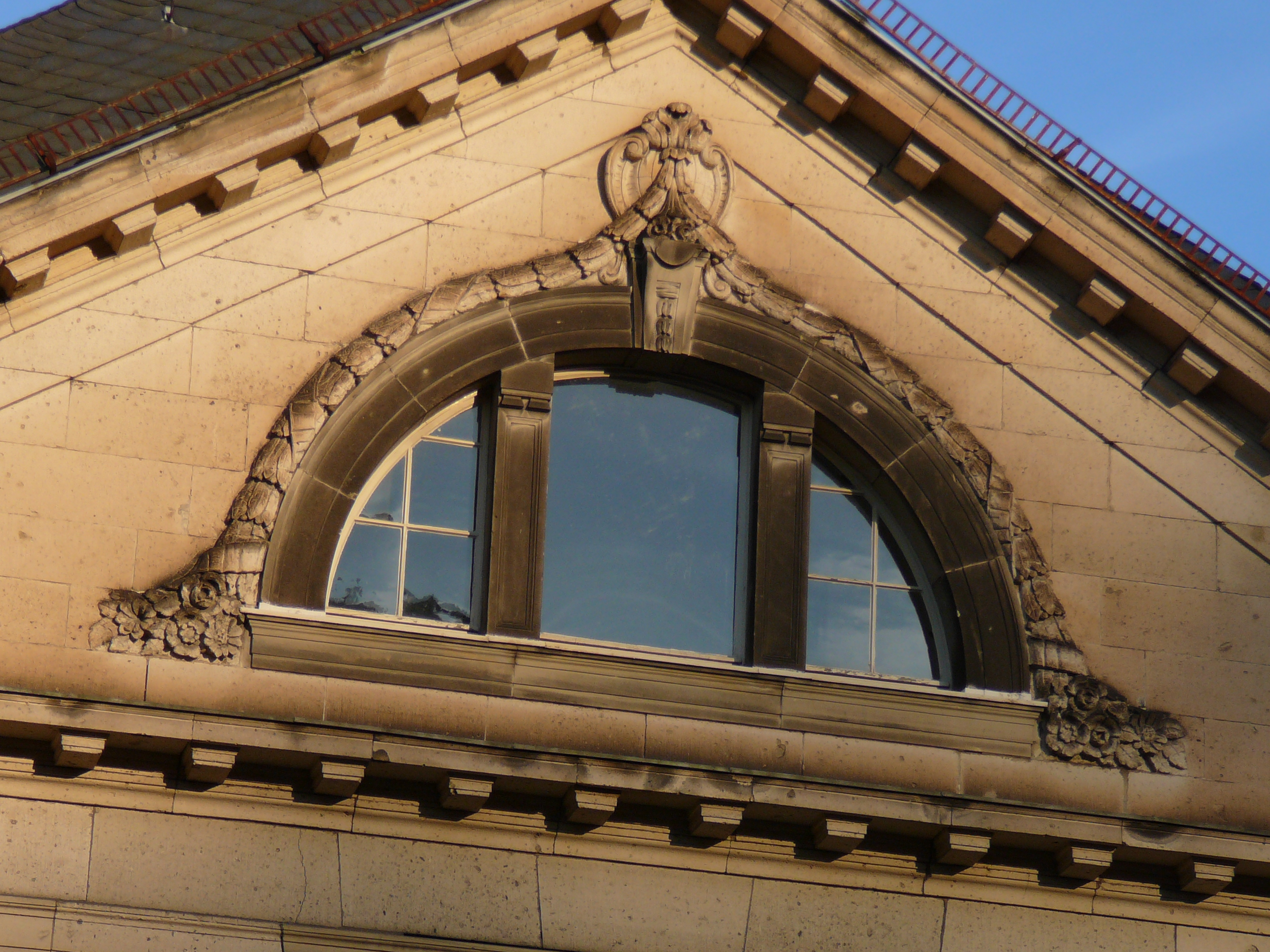 Am Buschhäuschen 70, Wuppertal